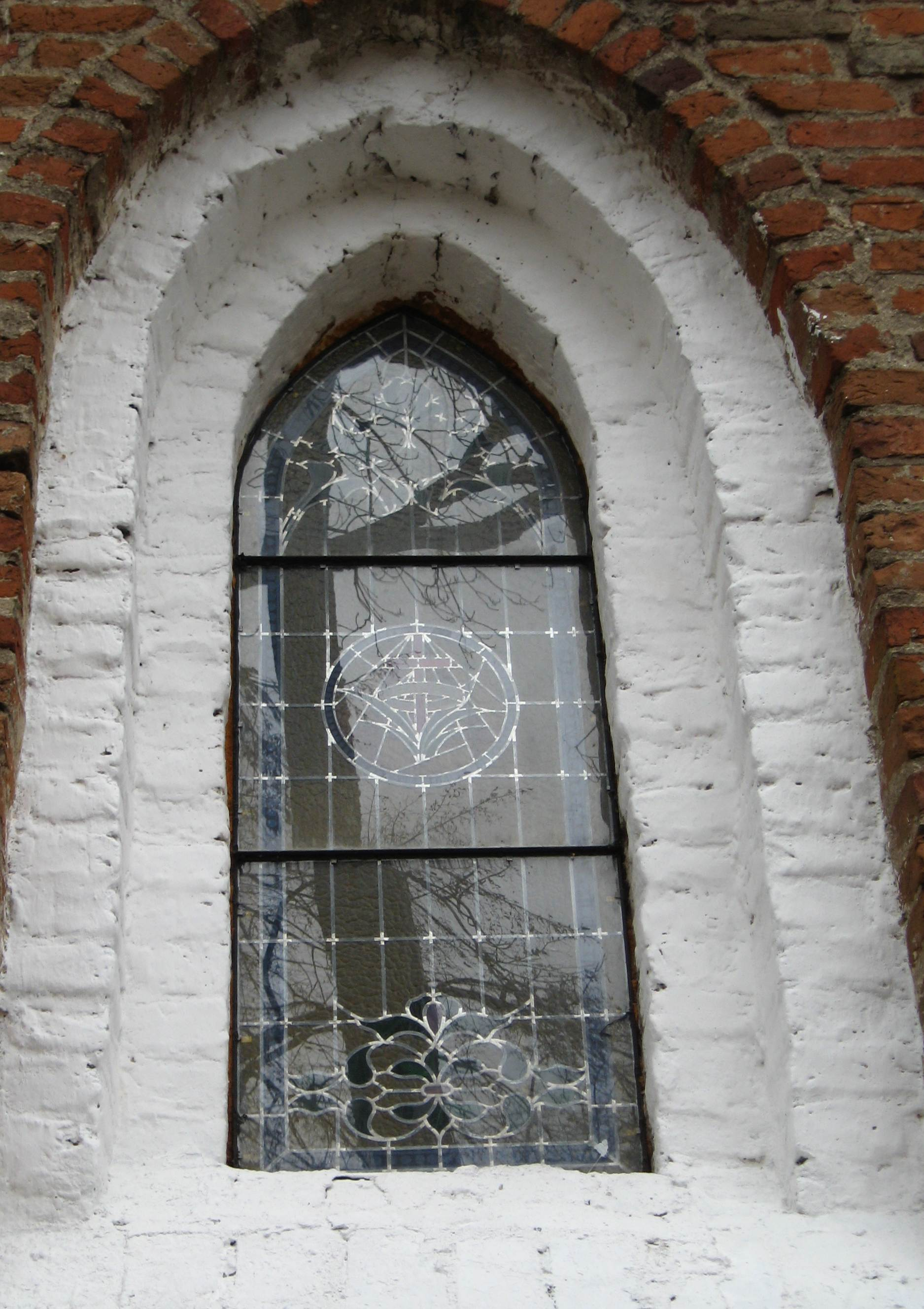 Kirche in Tołkiny, Polen.